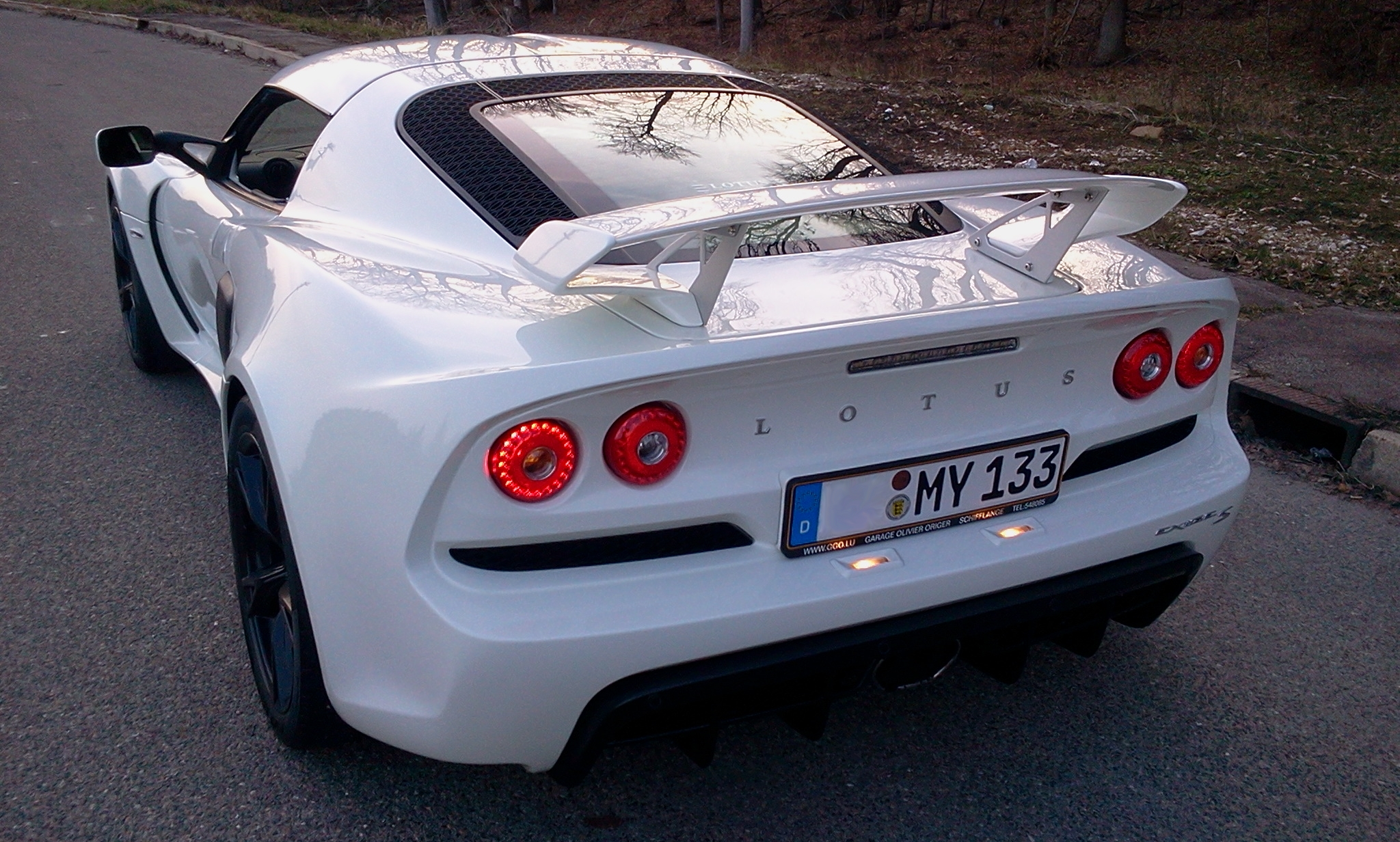 Lotus Exige S V6 Modelljahr 2012 von hinten